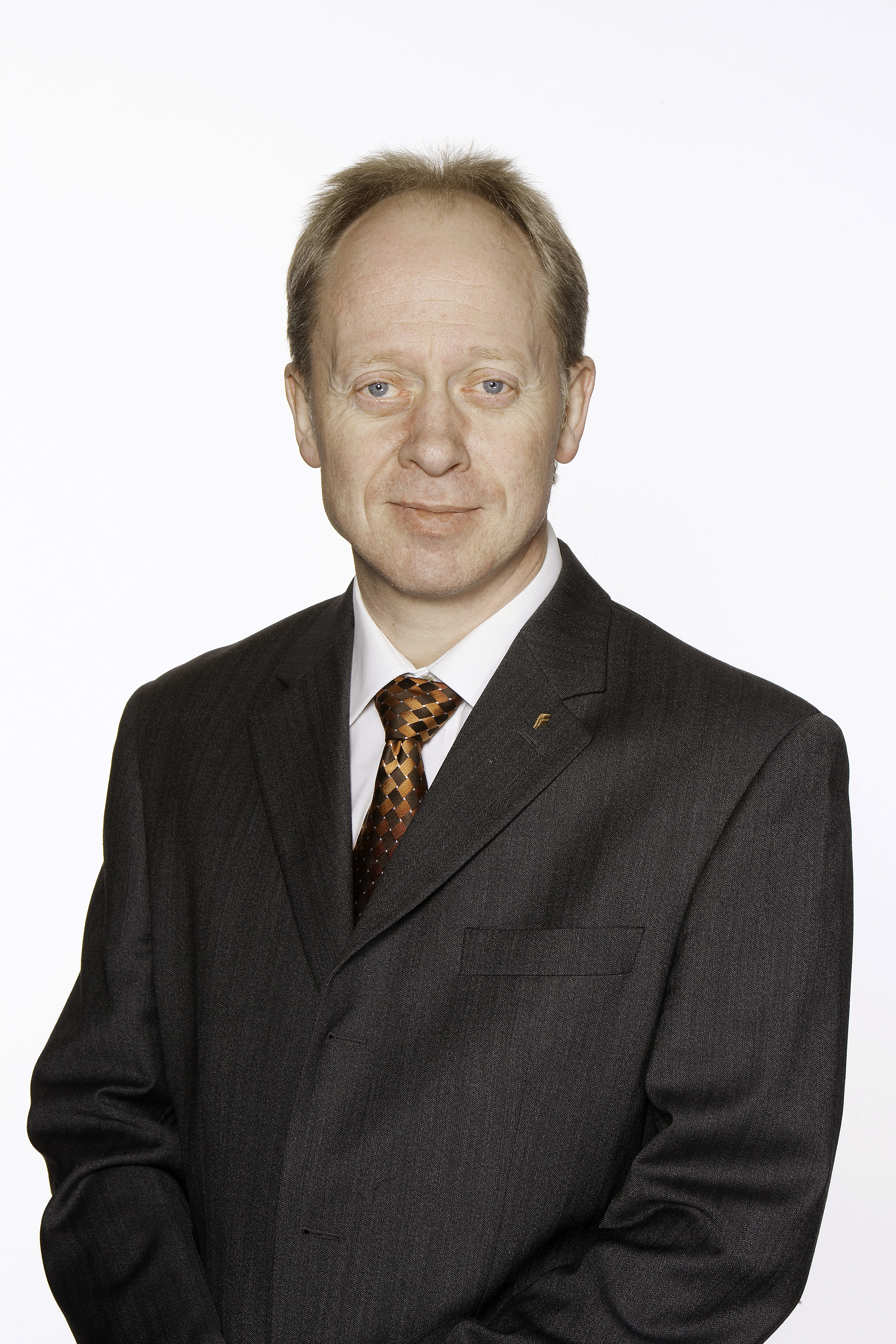 Jan Arild Ellingsen, FrP-politiker